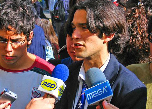 César Valenzuela, uno de los líderes de la movilización estudiantil de 2006, en Chile